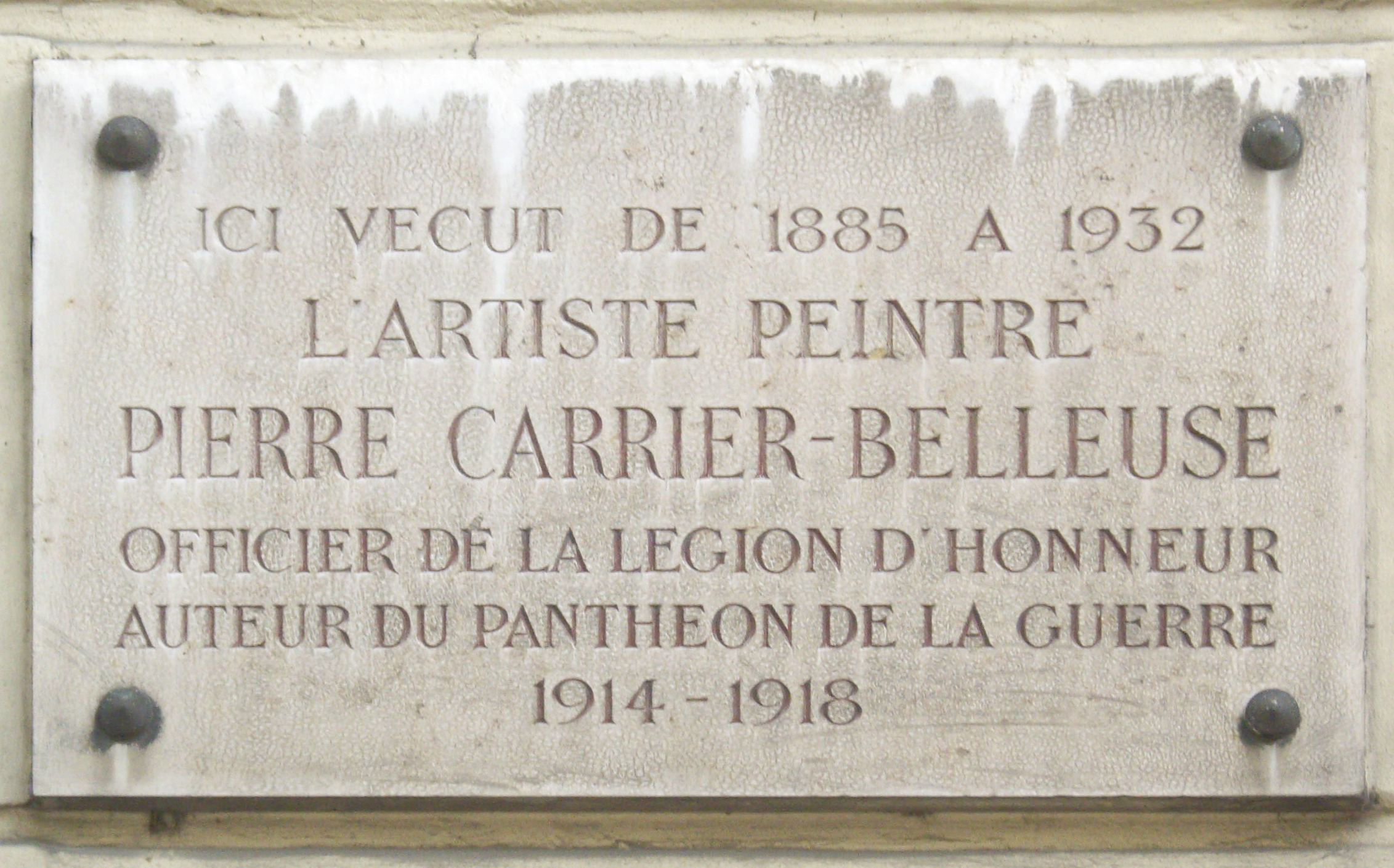 Plaque commémorative, 31 boulevard Berthier, Paris 17e. « Ici vécut de 1885 à 1932 l'artiste peintre Pierre Carrier-Belleuse, officier de la Légion d'honneur, auteur du Panthéon de la Guerre 1914-1918. »